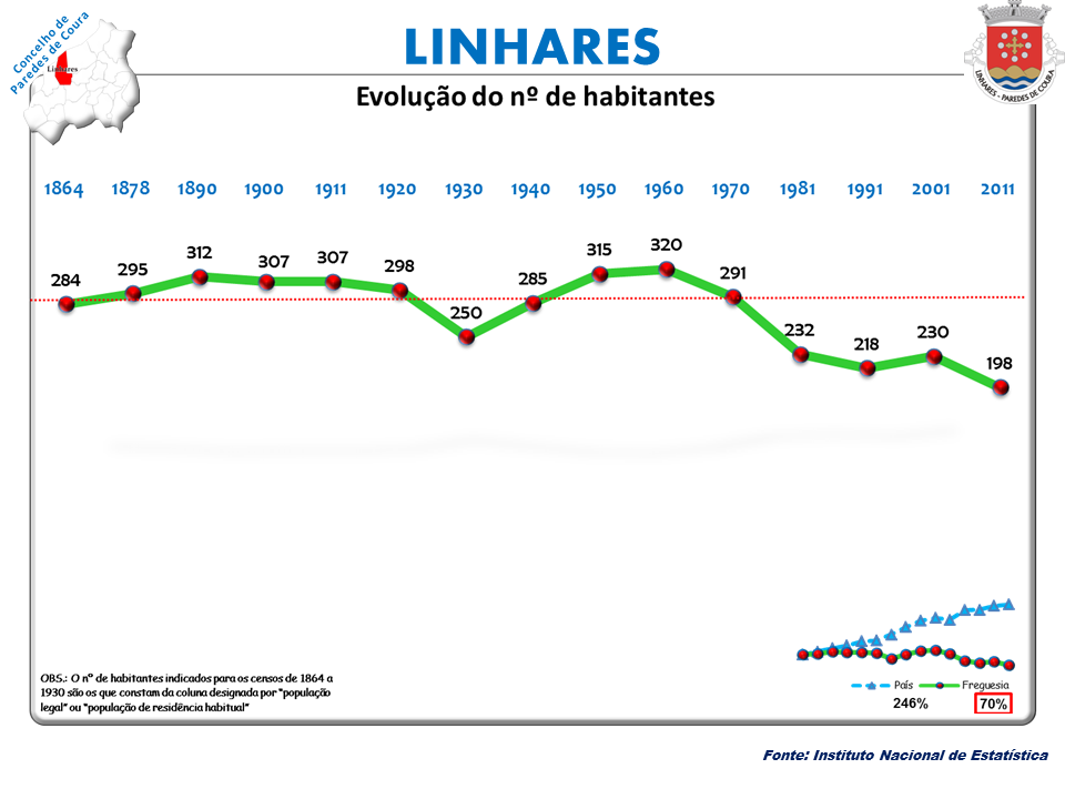 Censos 1864/2011